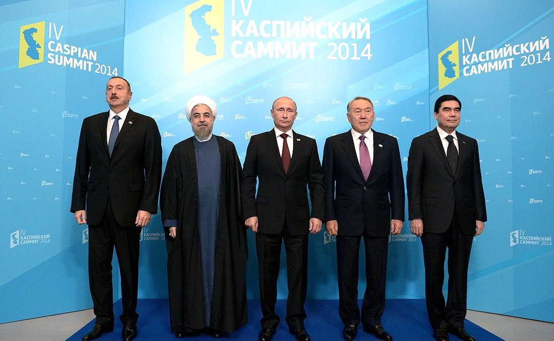 IV Каспийский саммит. Главы государств – участники IV Каспийского саммита (слева направо): Президент Азербайджана Ильхам Алиев, Президент Ирана Хасан Рухани, Президент России Владимир Путин, Президент Казахстана Нурсултан Назарбаев, Президент Туркменистана Гурбангулы Бердымухамедов.